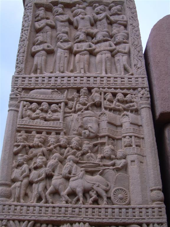 Detail on Sanchi stupa